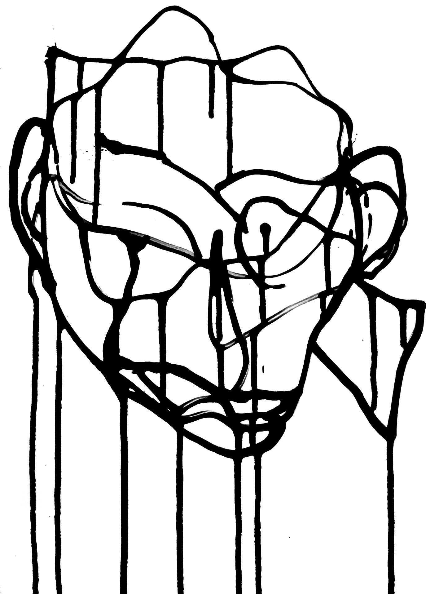 Pintura sobre papel nº 13 de la serie 'Down By Law' del artista Fasim de Barcelona.